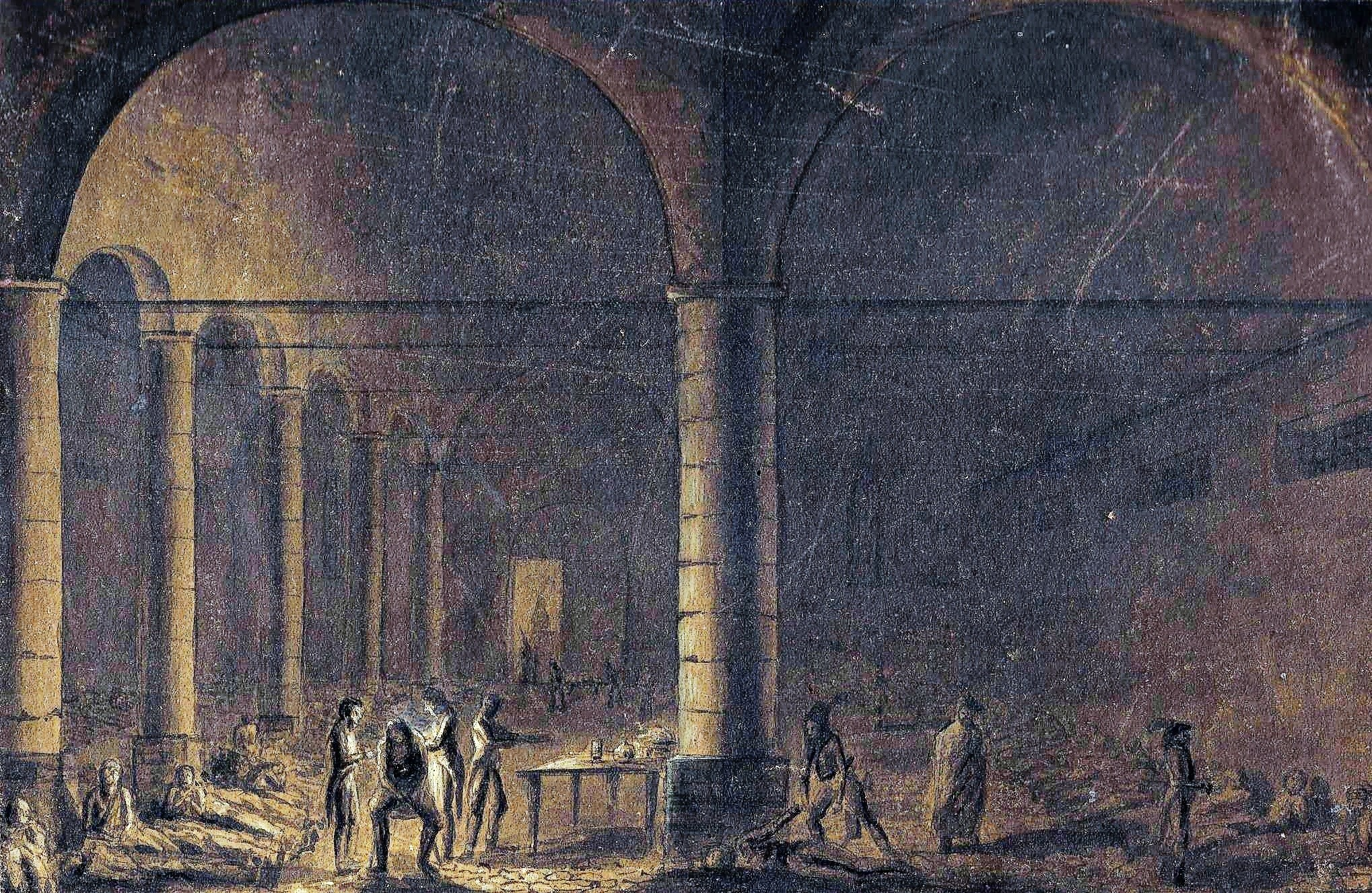 Militärlazarett in einer Kirche aus der Zeit der Koalitionskriege. Anonyme Sepiazeichnung um 1800.